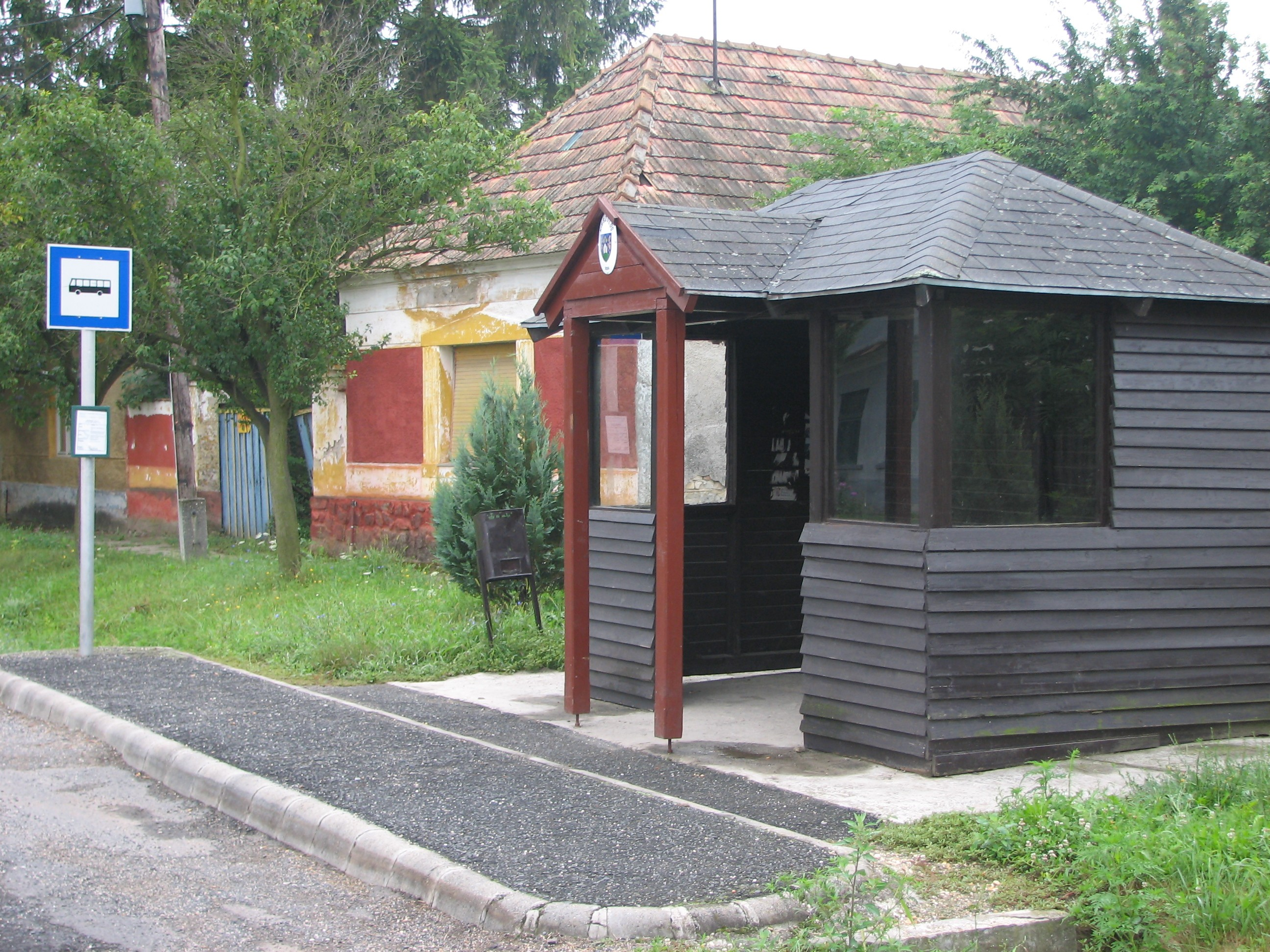 Buszváró (Kisszőlős, Veszprém megye)